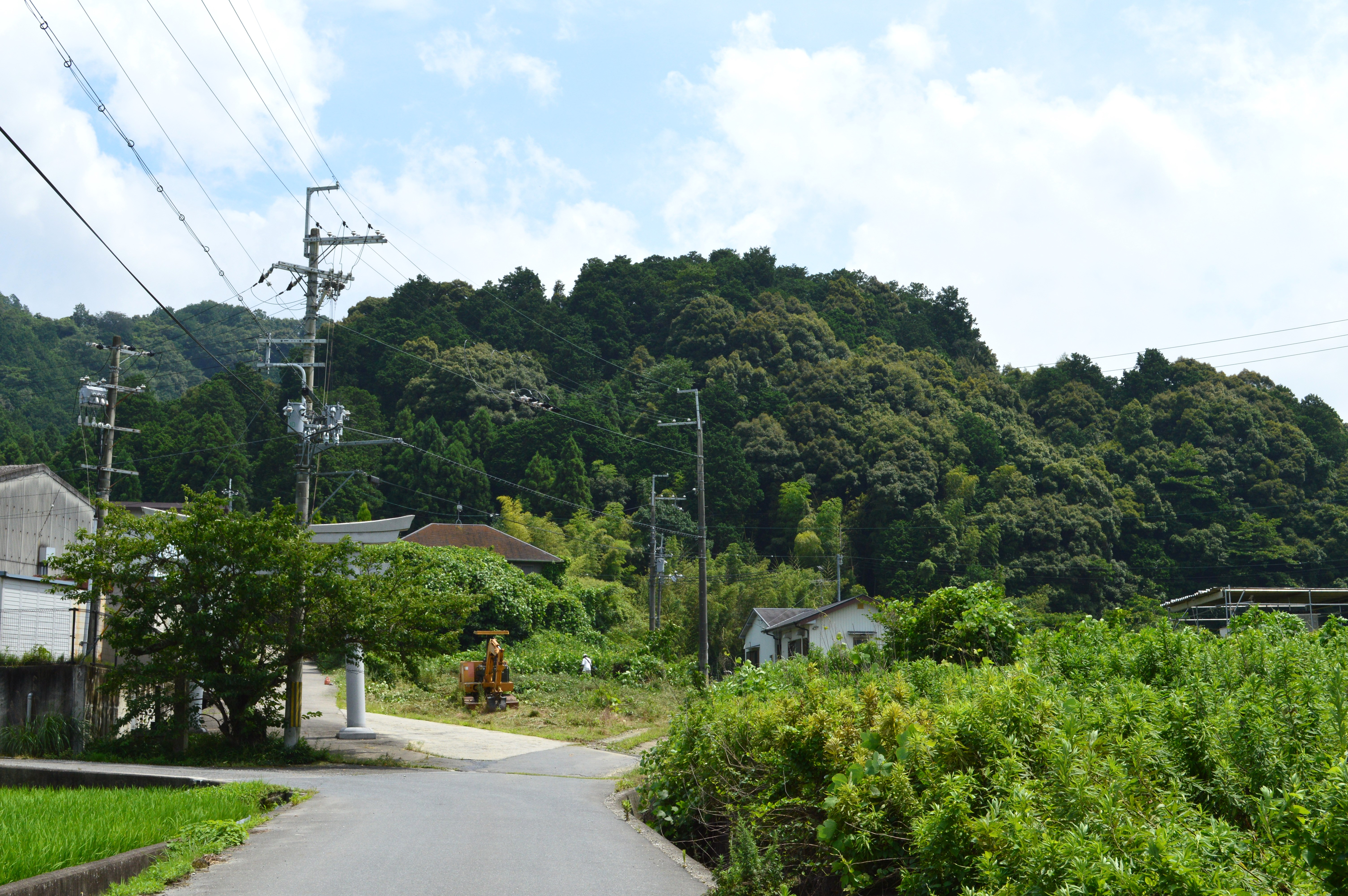 葛木御歳神社 大鳥居と御歳山